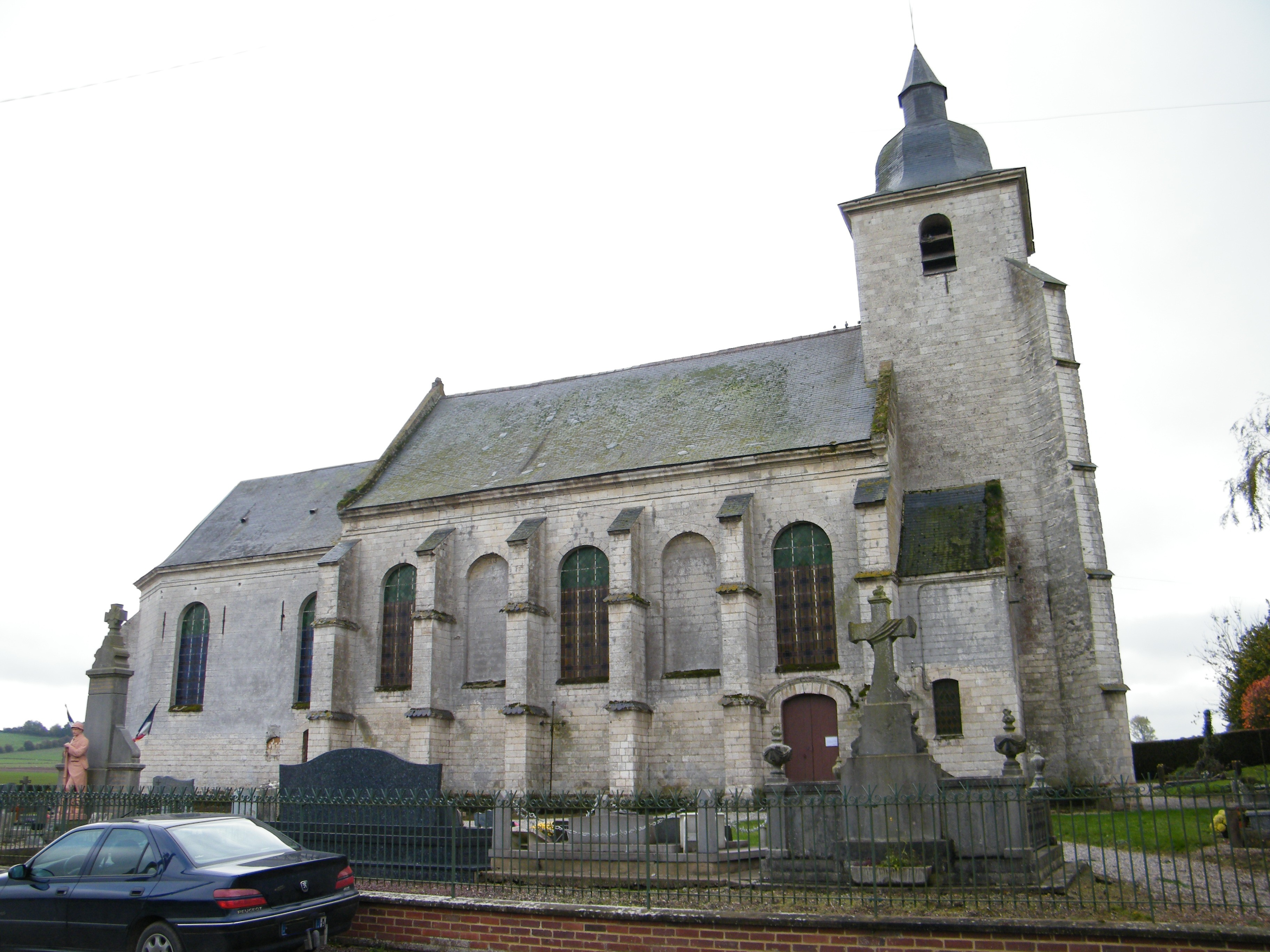 Vitz-sur-Authiel, Pas-de-Calais, église.